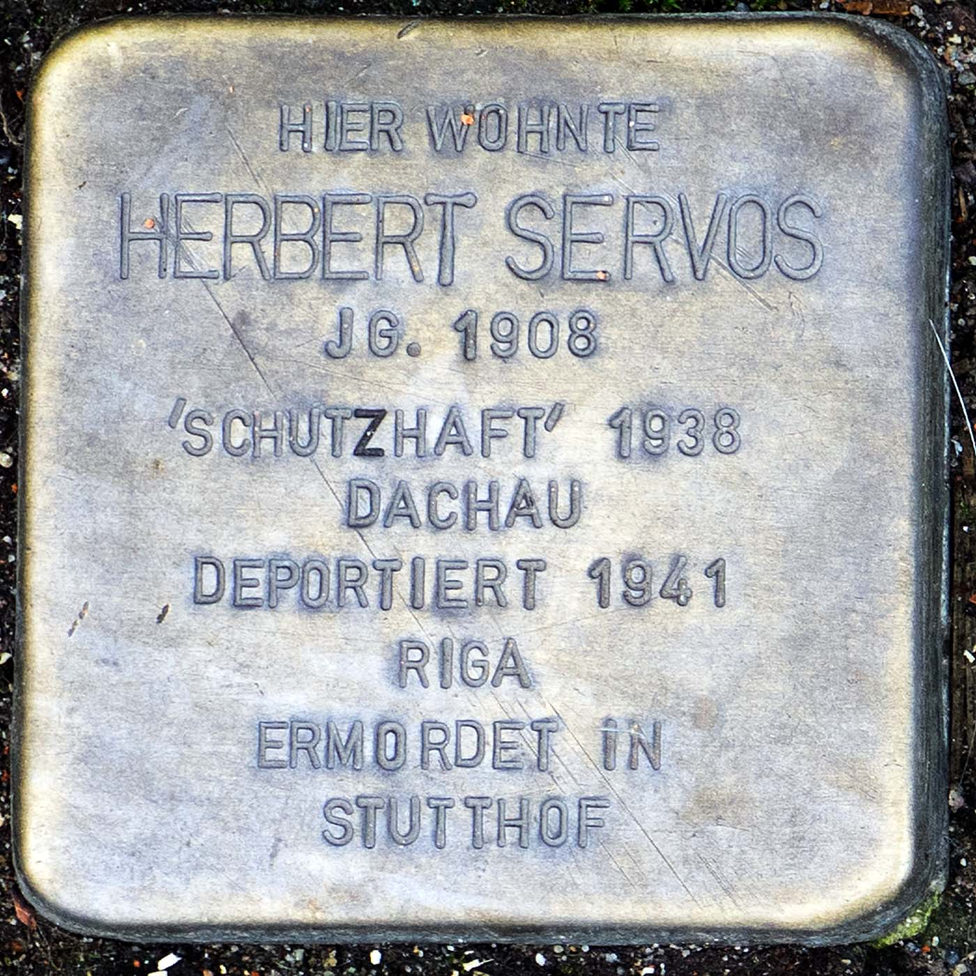 Stolperstein für Herbert Servos (Willich)